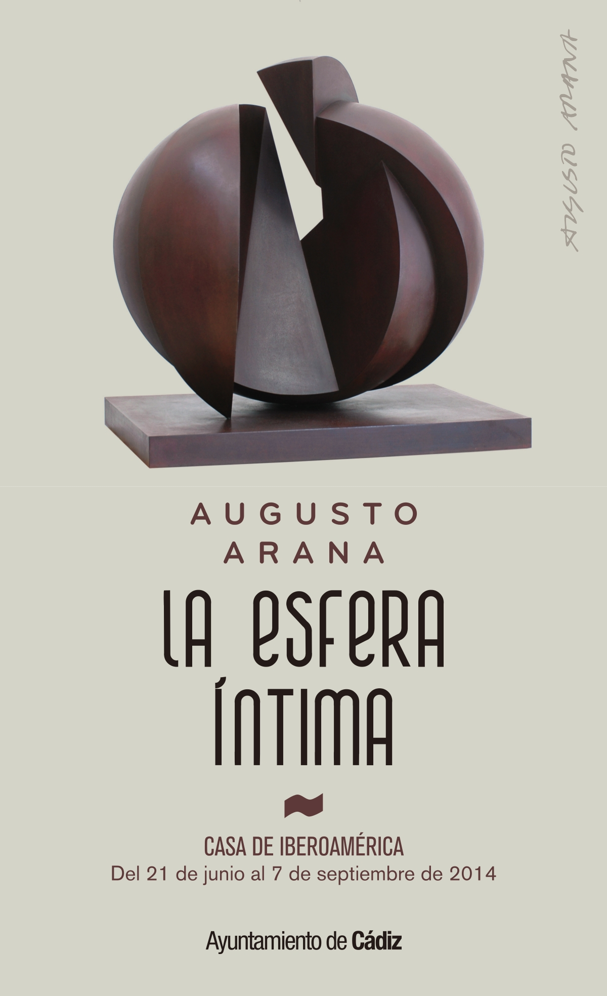 Exposición "La Esfera Íntima" Cádiz. Año 2014